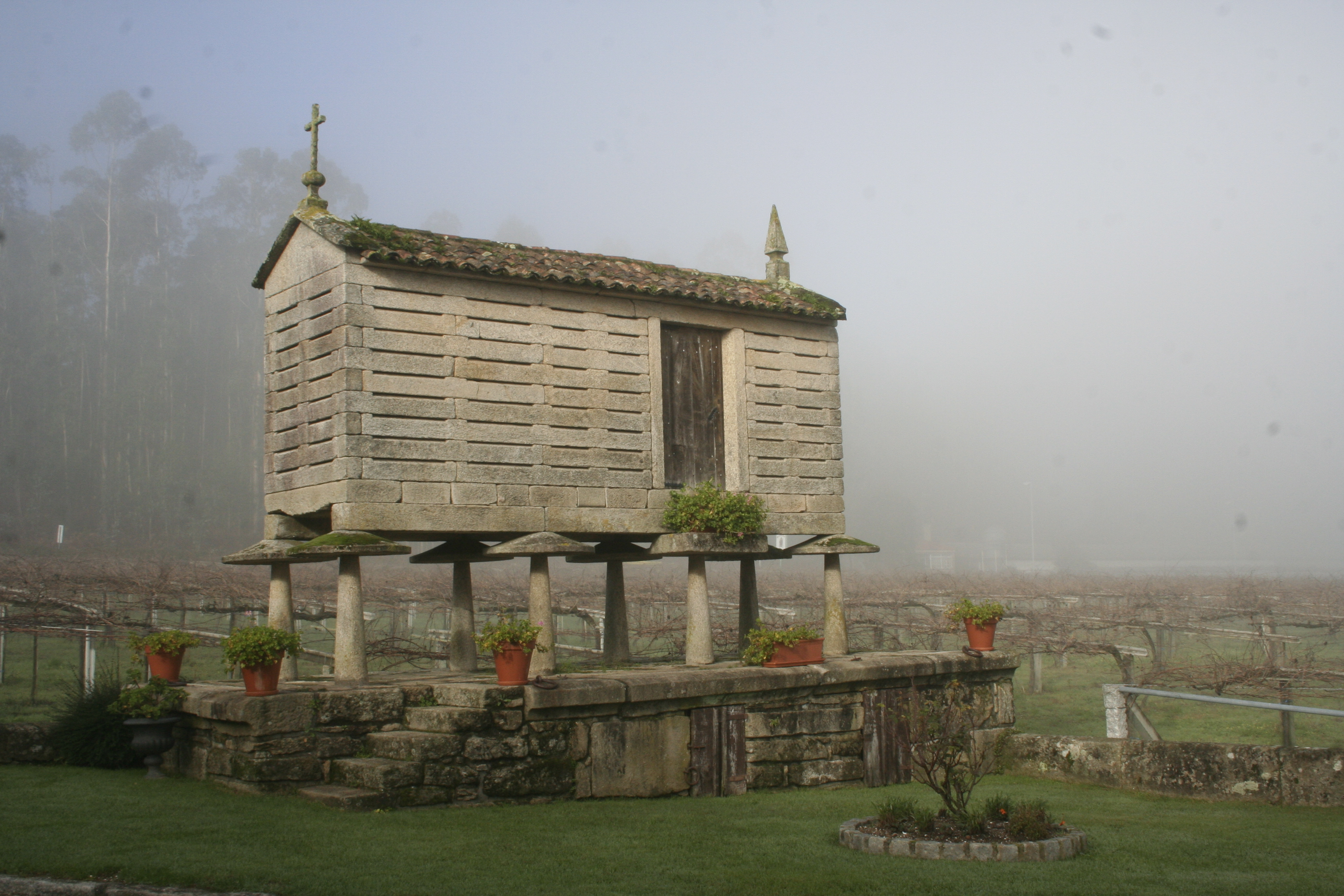 Piorno (Hórreo) a rentes das bodegas de Albariño Gran Bazán na parroquia de Tremoedo, concello de Vilanova de Arousa, na provincia de Pontevedra, Galiza.